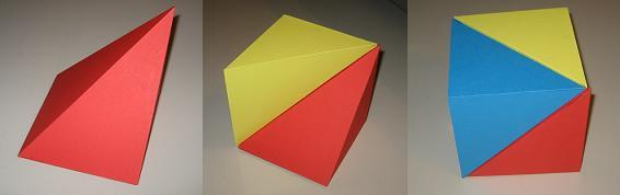 3 piramids